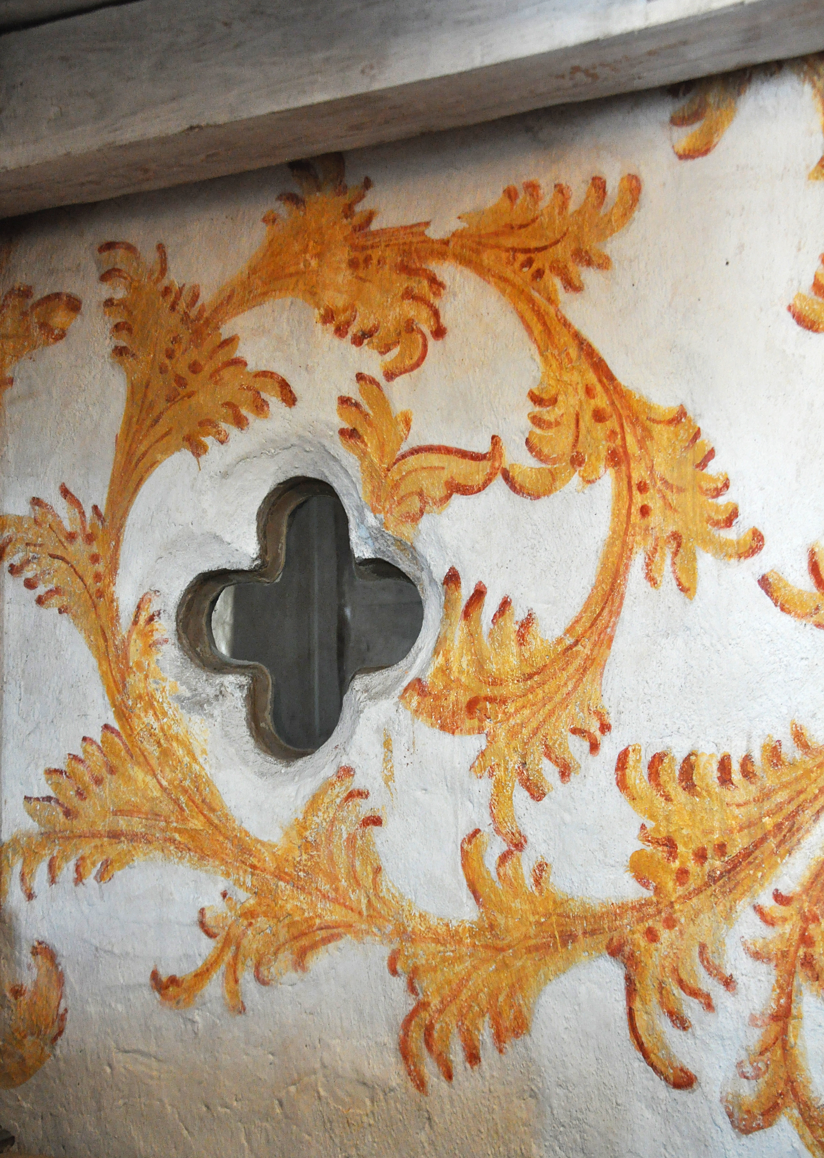 Hagioskop till inclusorium.